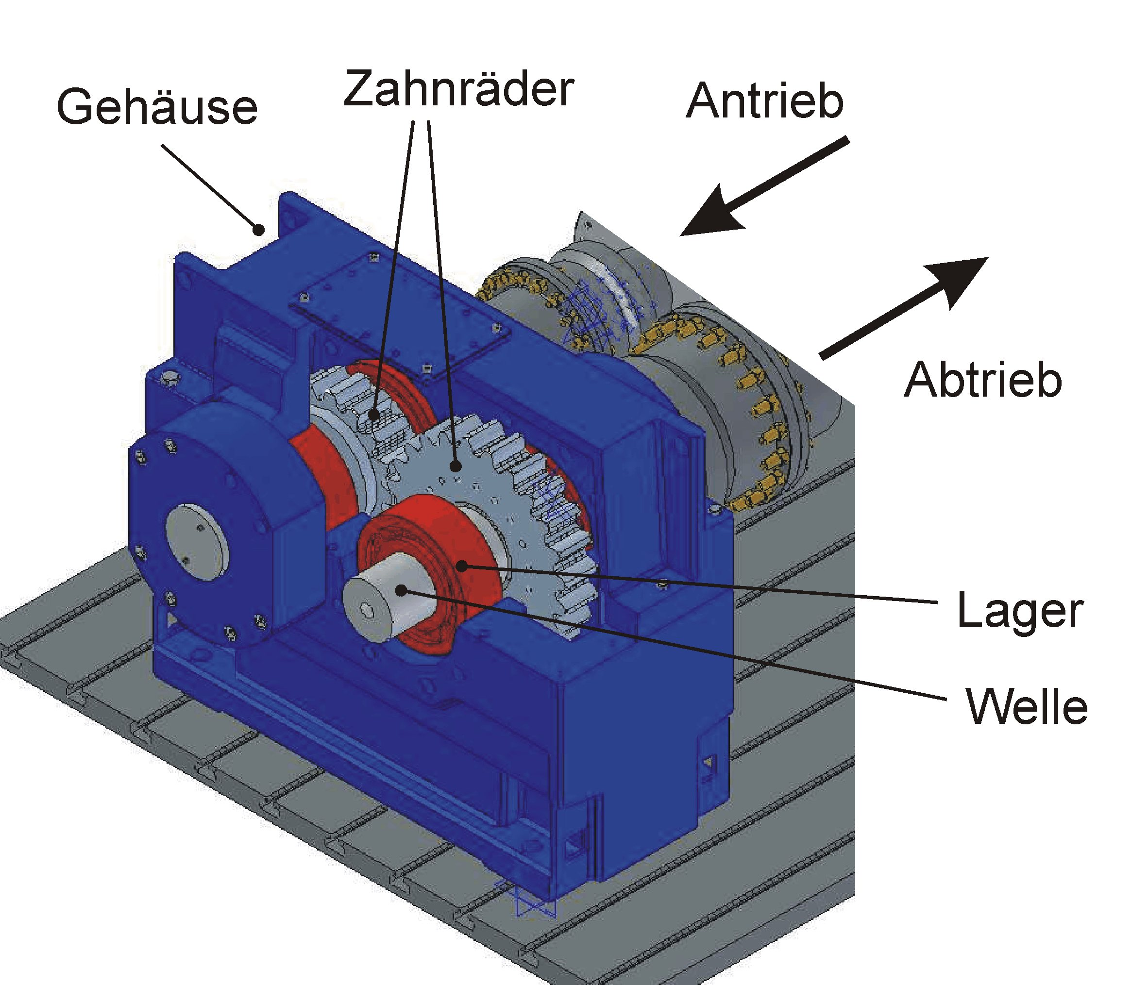 Skizze eines einstufigen Strinradgetriebes